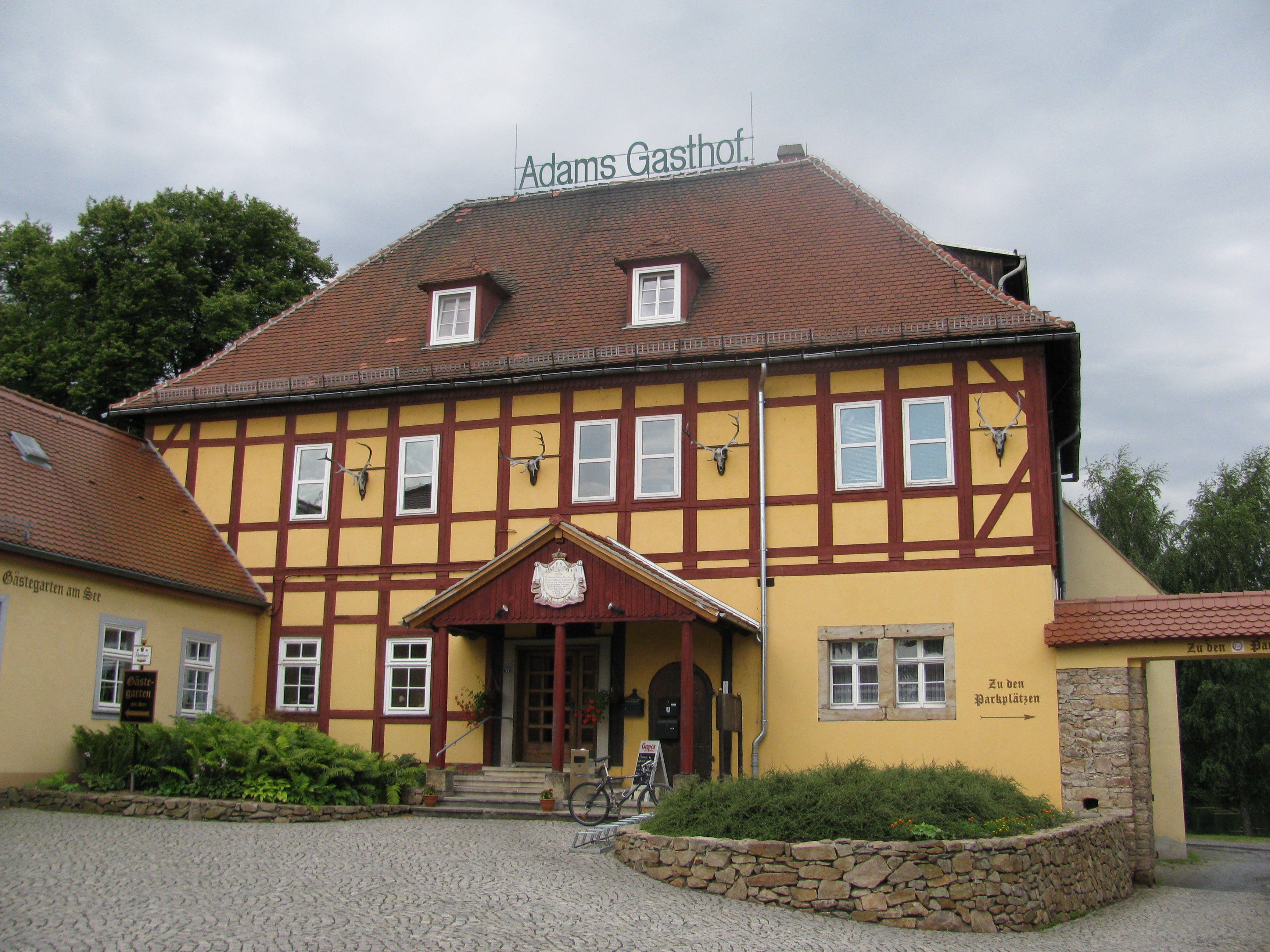 Hauptgebäude von Adams Gasthof am Markt des früheren Marktfleckens Eisenberg, Gemeinde Moritzburg, Sachsen